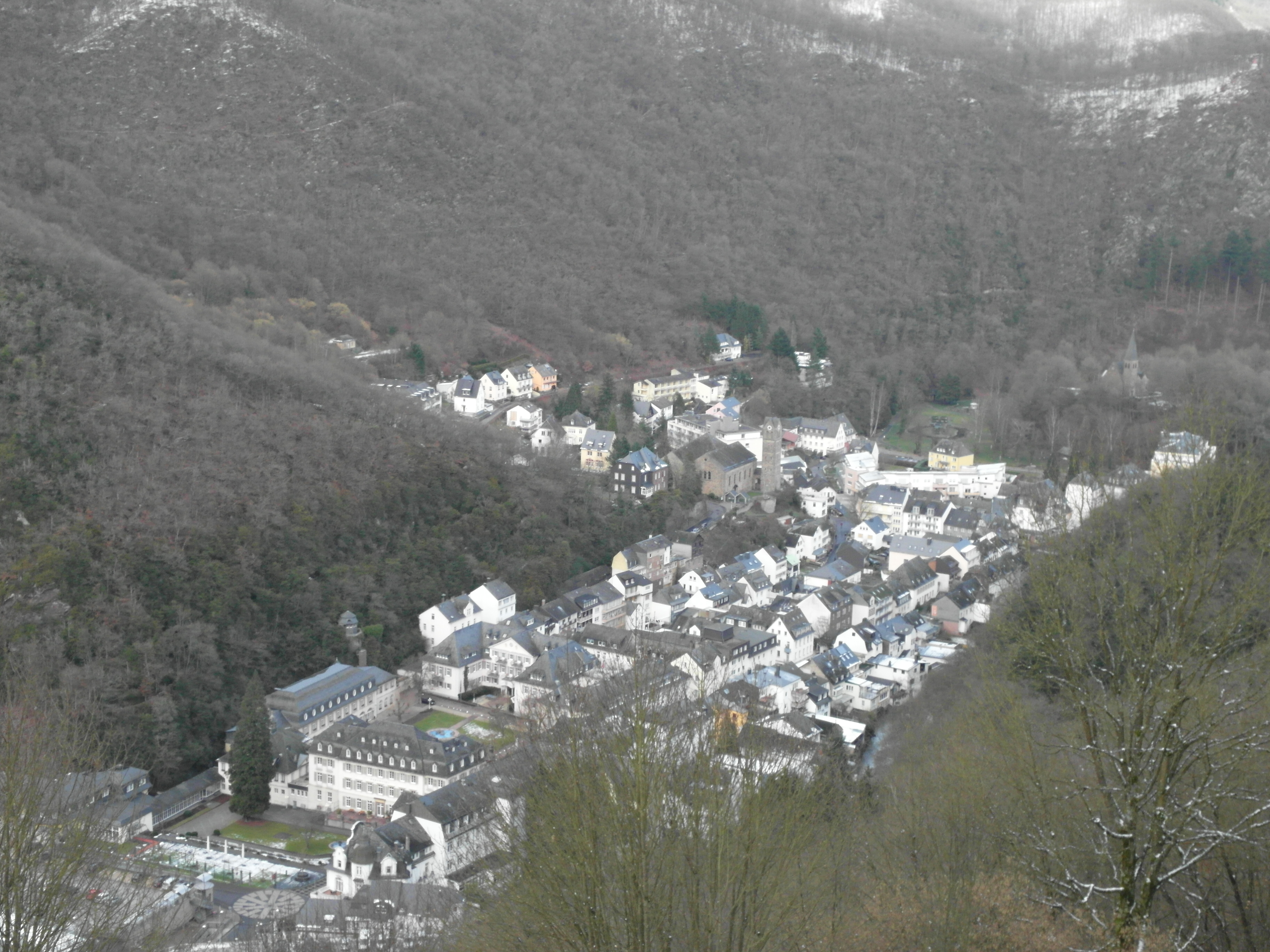 Bad Bertrich, Panorama von Südwesten